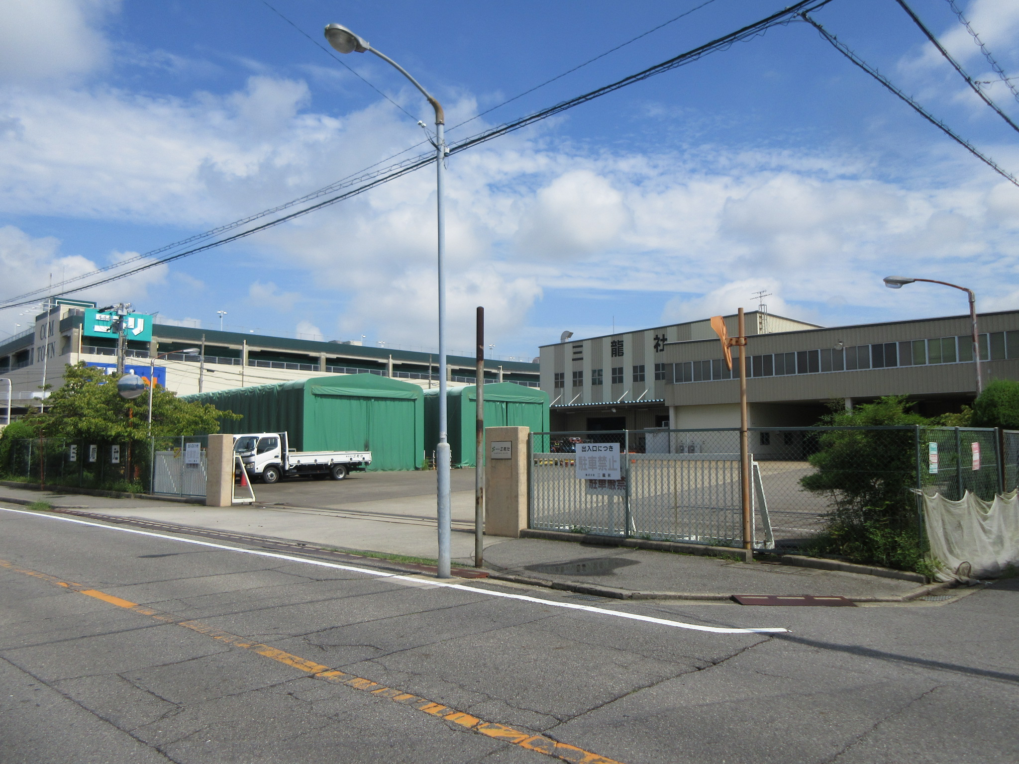 三龍社本社（岡崎市上六名町）